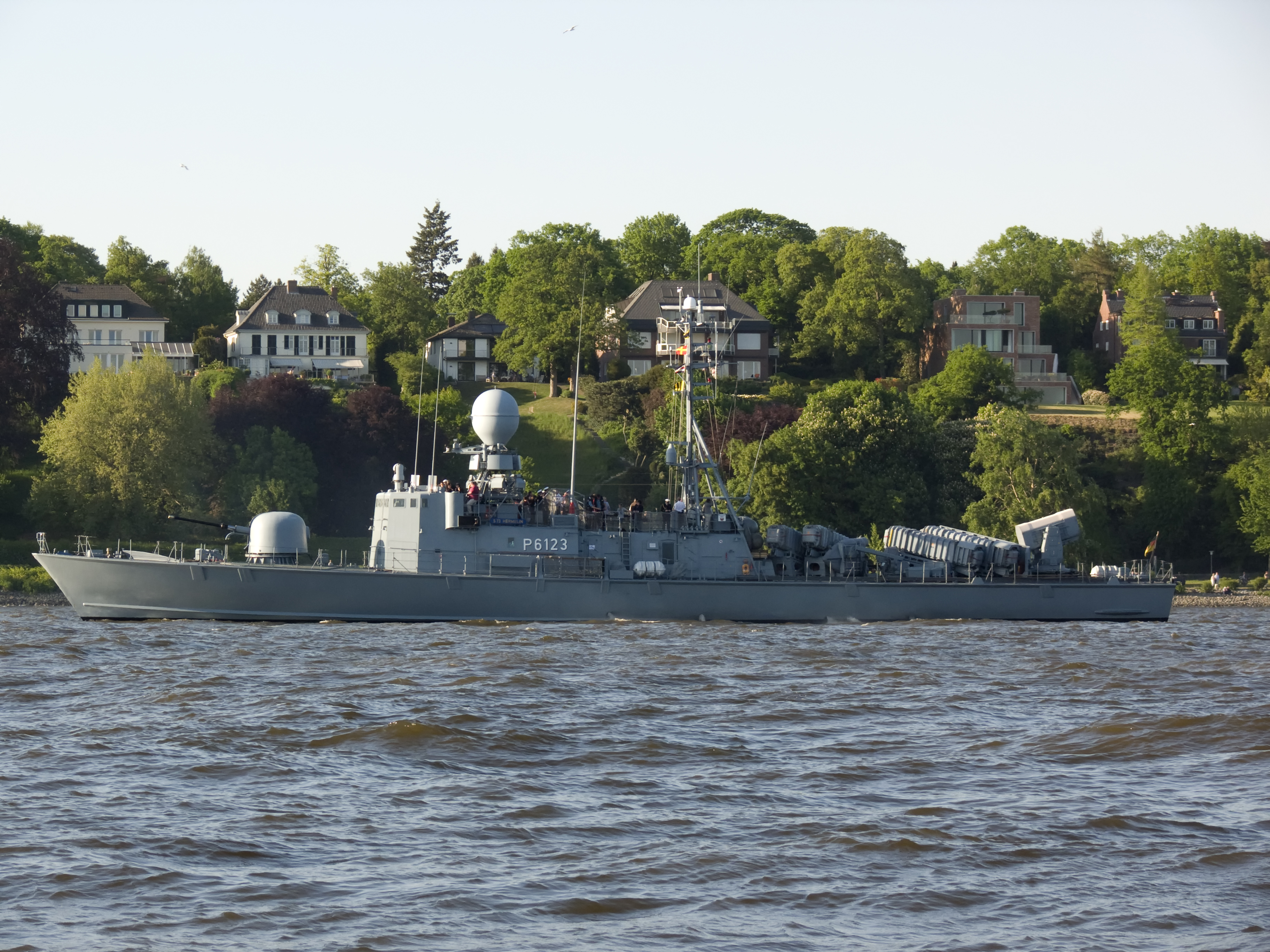 Schnellboot S 73 "Hermelin" am 8 Mai 2011 Auslaufparade Hamburg Outbound